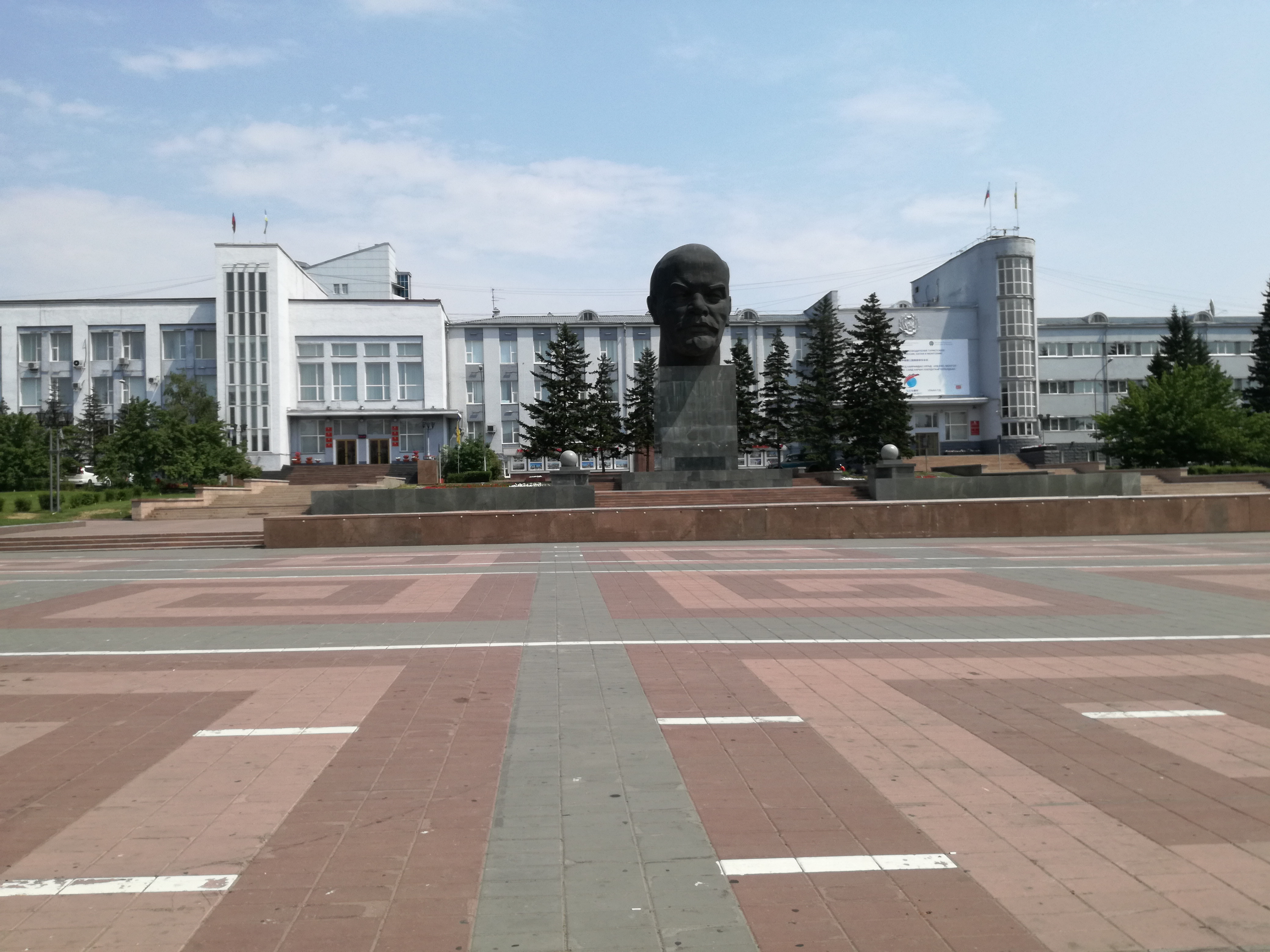 Улан Удэ